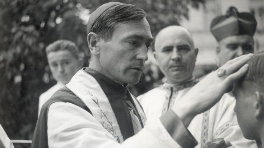 Márton Áron áldást oszt